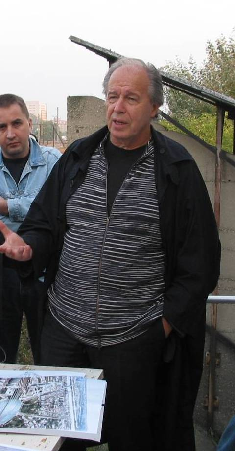 de: Boris Podrecca, Architekt, auf dem Nordbahnhofgelände in Wien en: Architect Boris Podrecca on the Northern Railway Station in Vienna